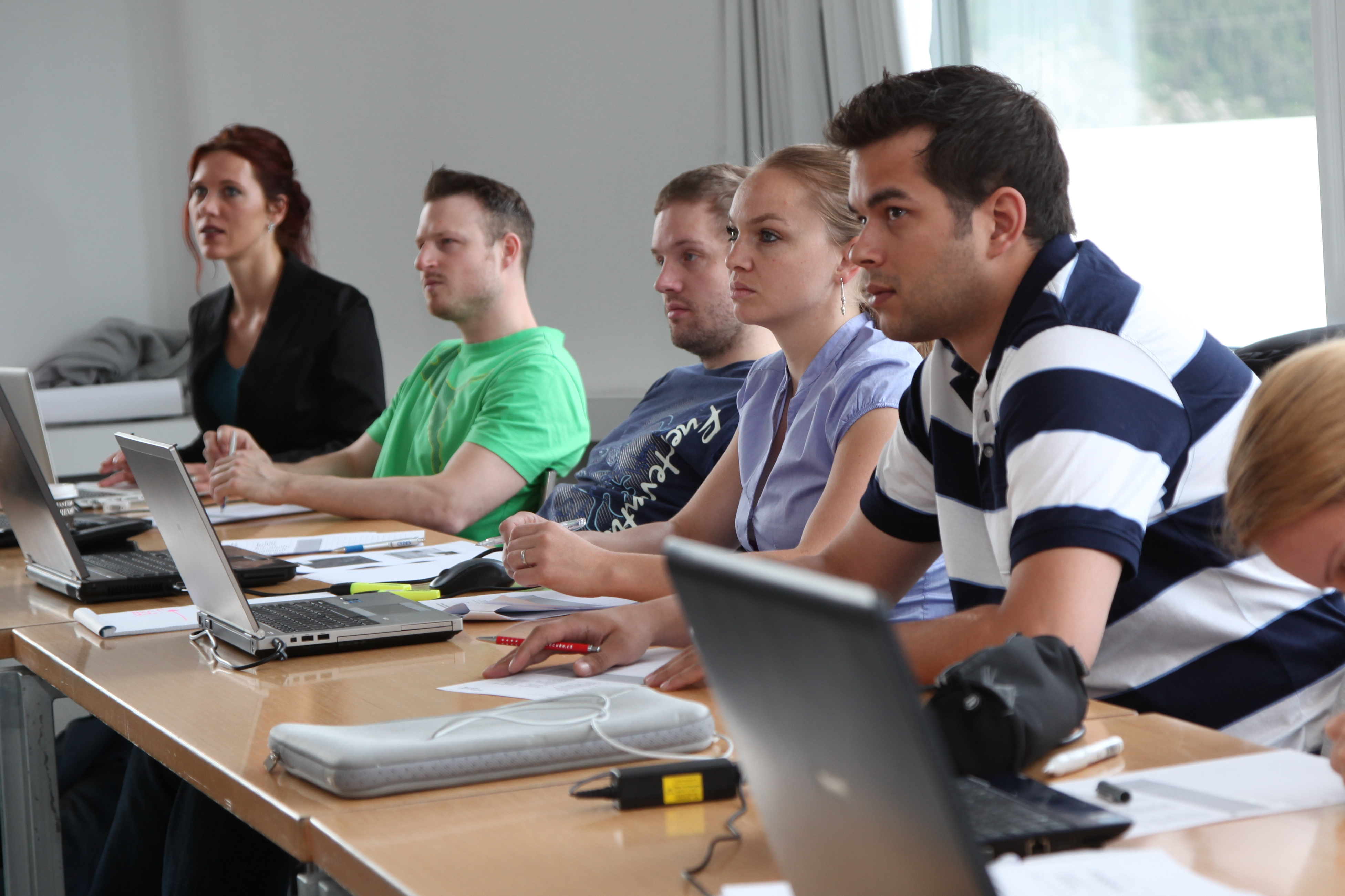 Unterricht Master Business Administration